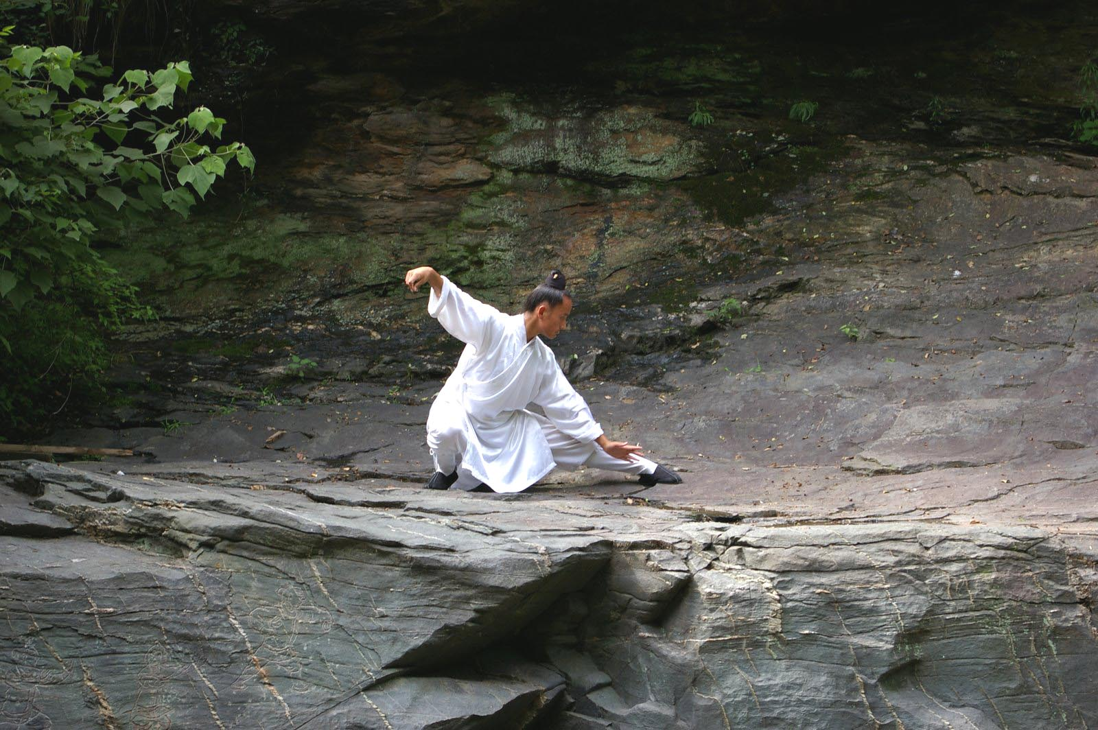 Taijiquan in den Wudangbergen